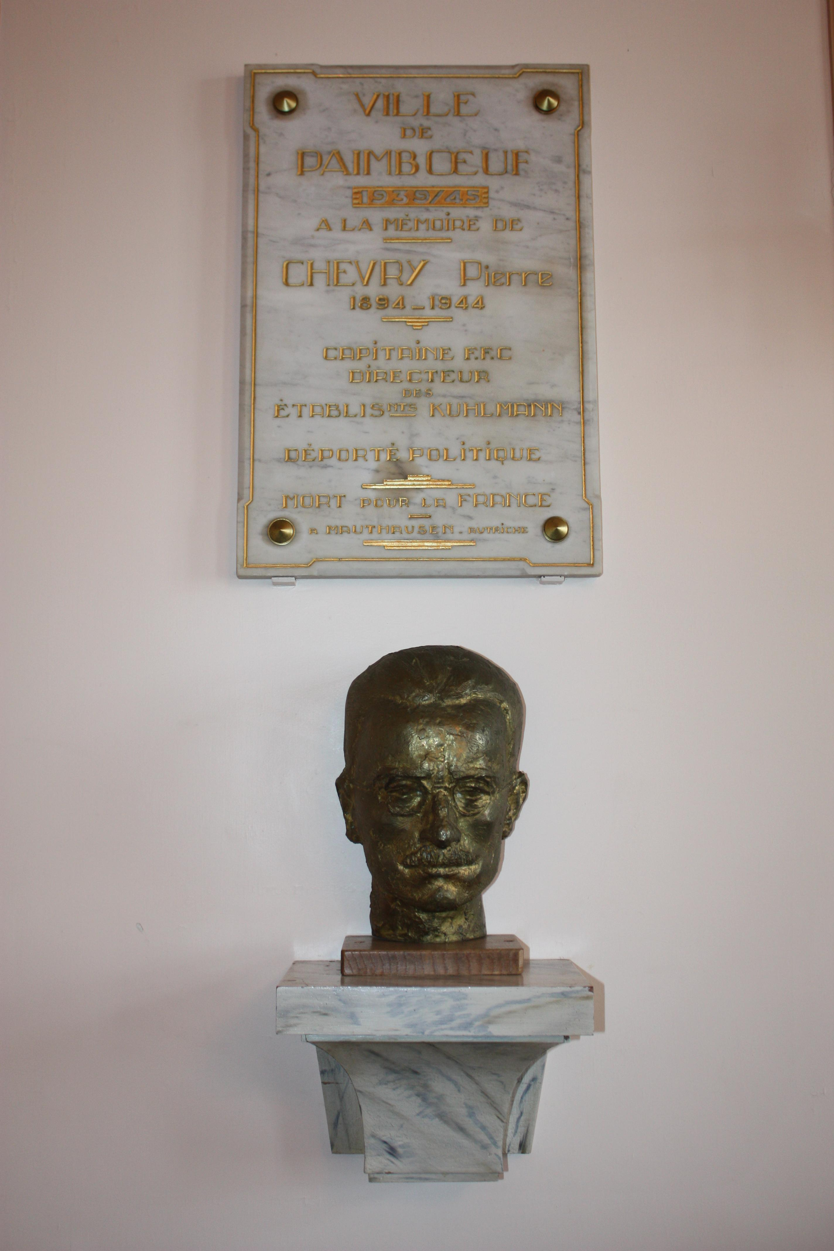 Buste de Pierre Roger CHEVRY, Mairie de Paimboeuf, France